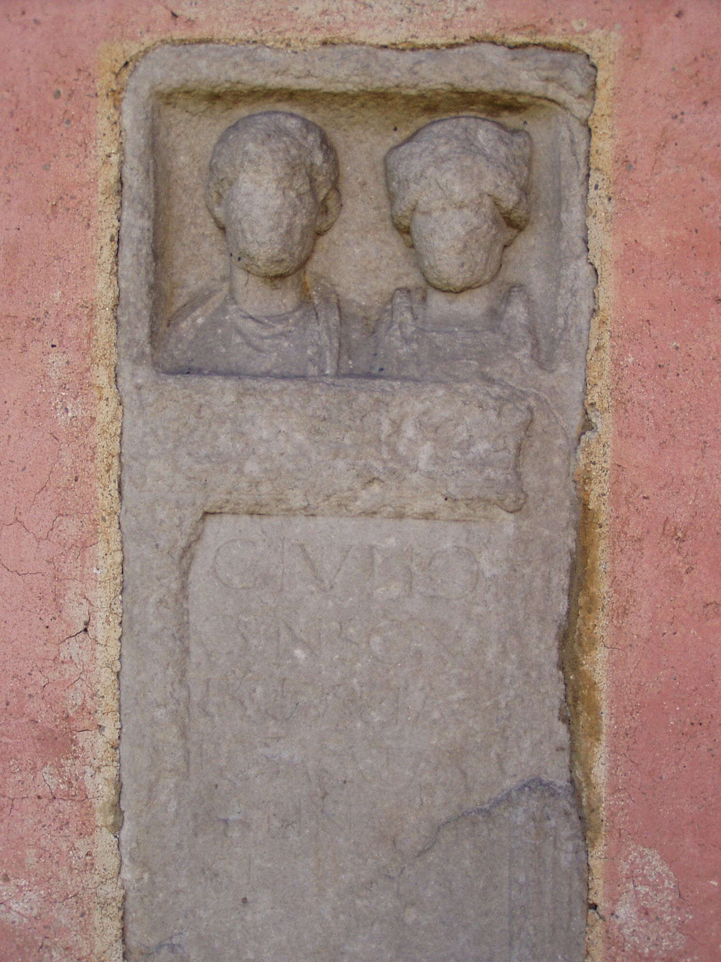 Prunnerkreuz, Detail, CIL III 4923, Zollfeld, Kärnten/Carinthia